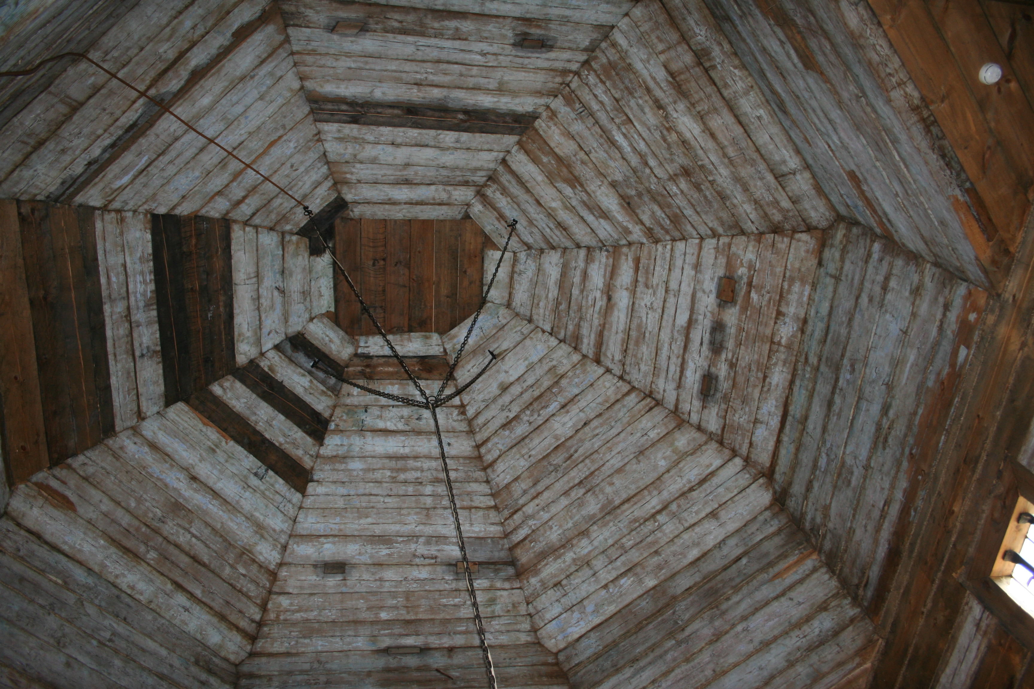 Воскресенская церковь в Суздальском музее деревянного зодчесва. Потолочное перекрытие.